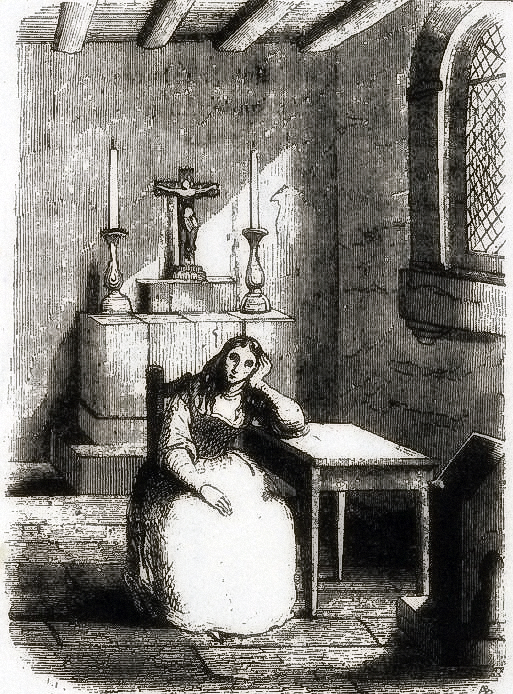 "La Quintrala. Catalina de Los Ríos y Lisperguer, según un grabado de la época."